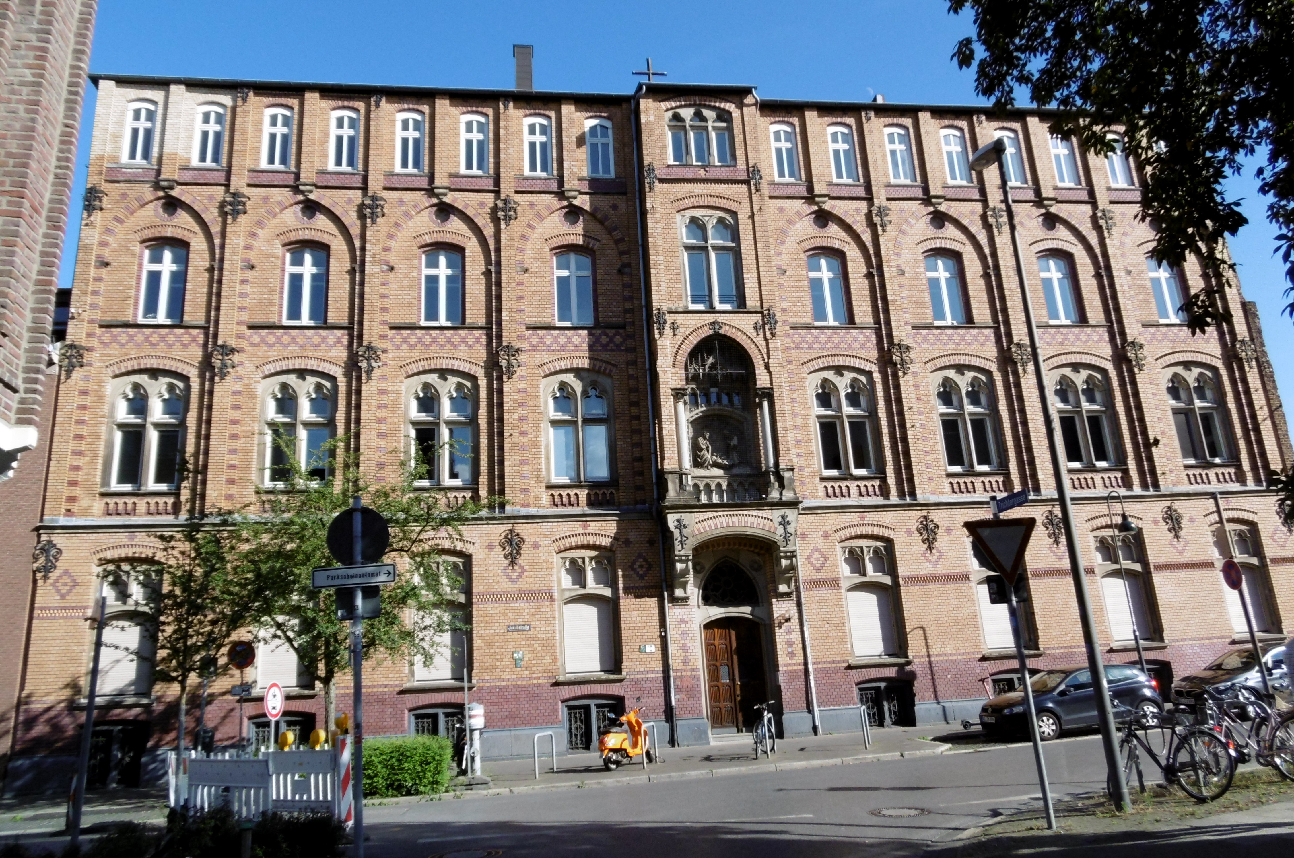 Hauptgebäude des ehemaligen Dominikanerklosters in Aachen